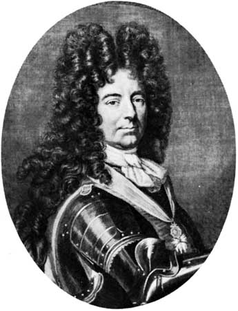 Portrait of Louis François, duc de Boufflers (1644-1711), french military leader.